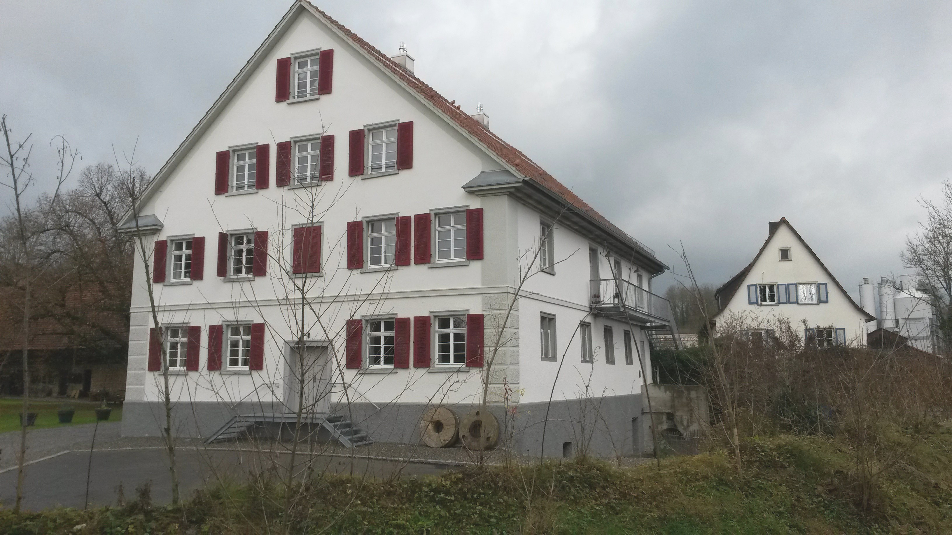 Mühle in Ittenhausen / Oberschwaben